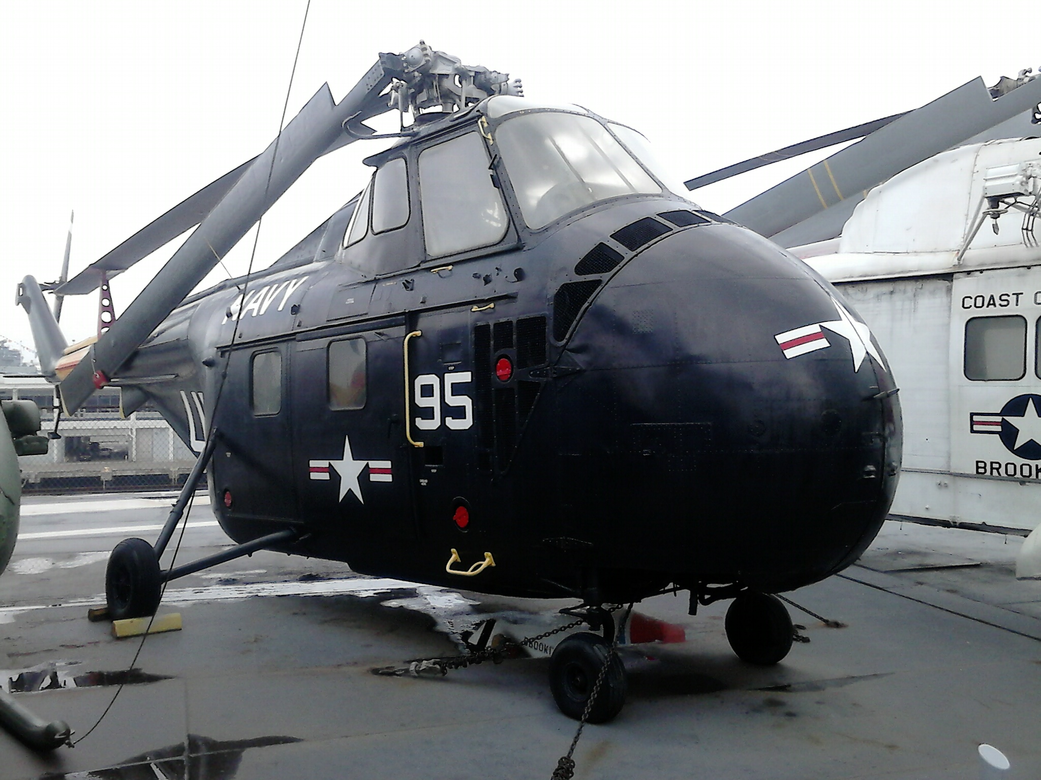 מסוק תובלה בינוני סיקורסקי S-55, בתצוגה הקבועה על נושאת המטוסים "אינטרפיד", בנמל ניו יורק